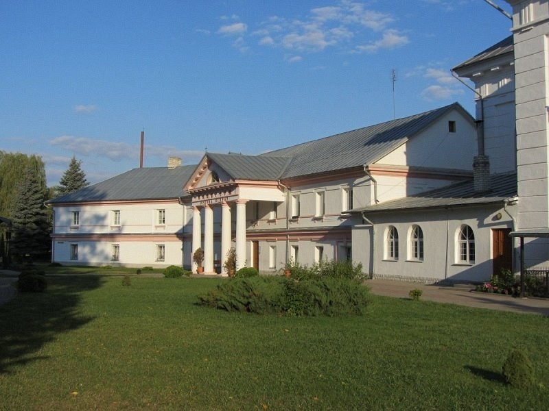 Шчучынскія краявіды